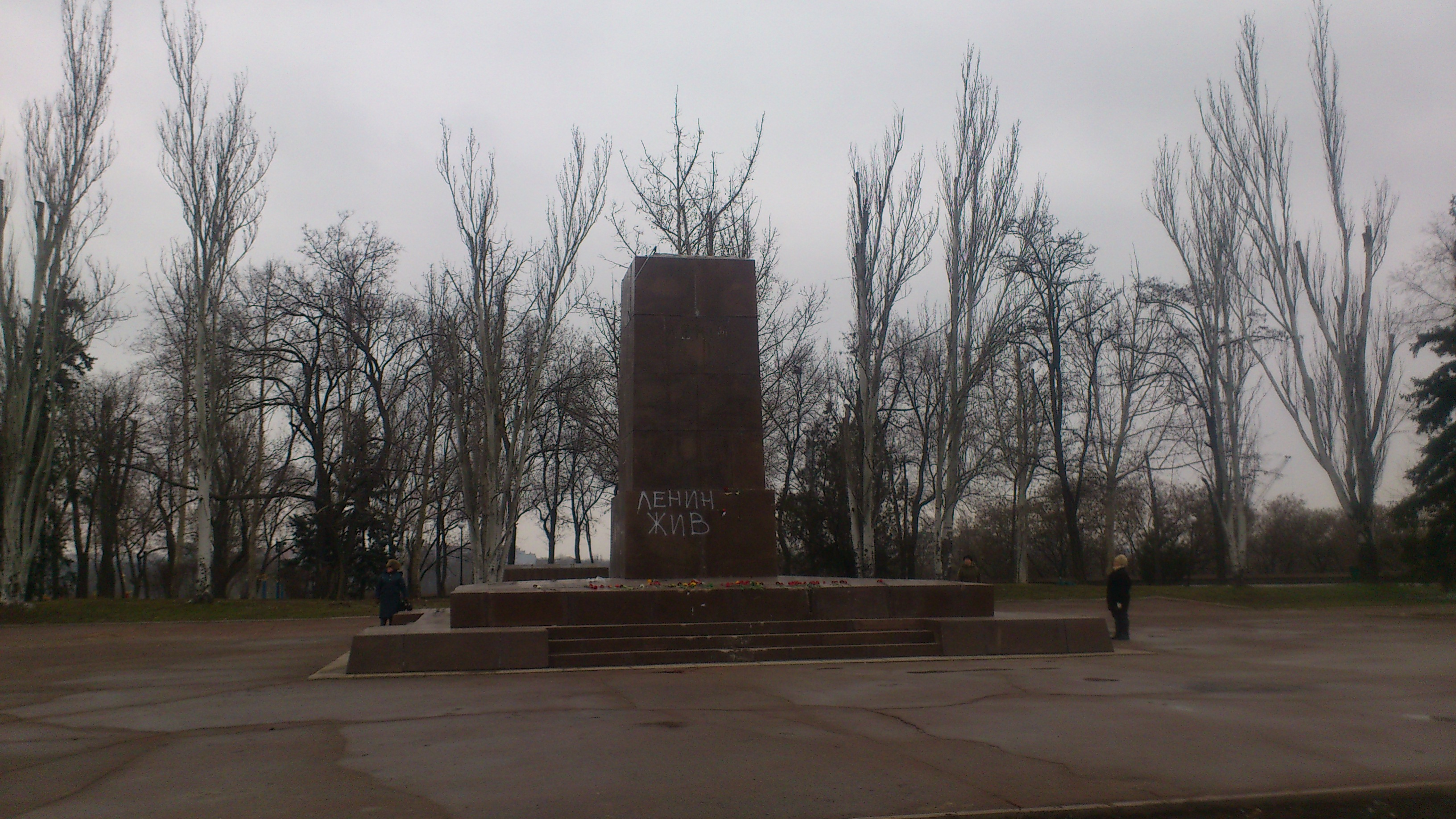 Все, що залишилось через 3 дні після знесення